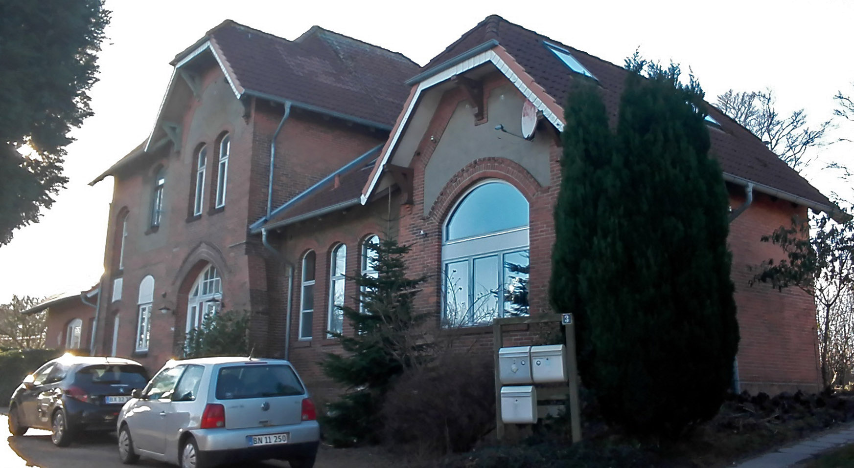 Rinkenæs Station fra vejsiden